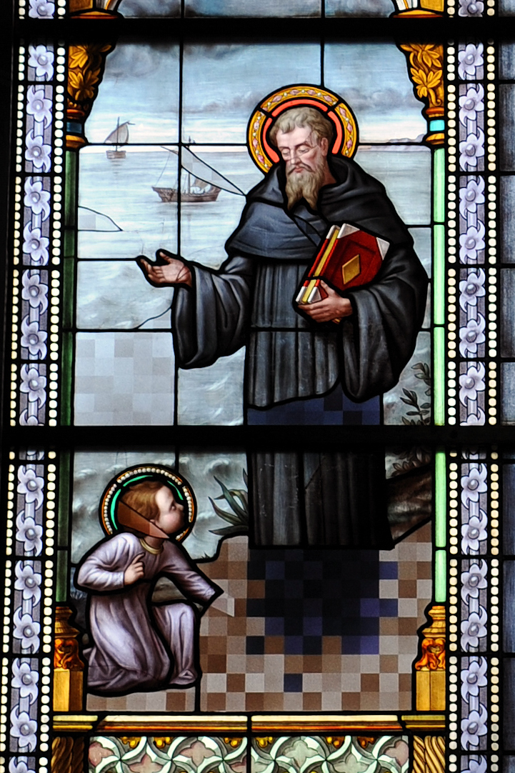 les vitraux